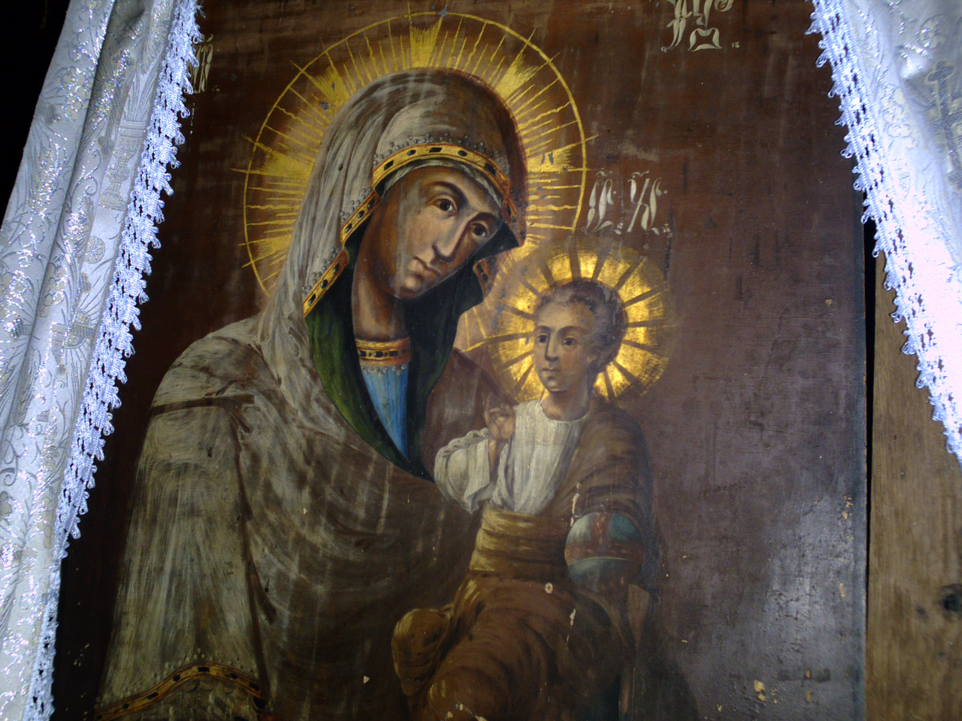 Biserica de lemn din Băneşti